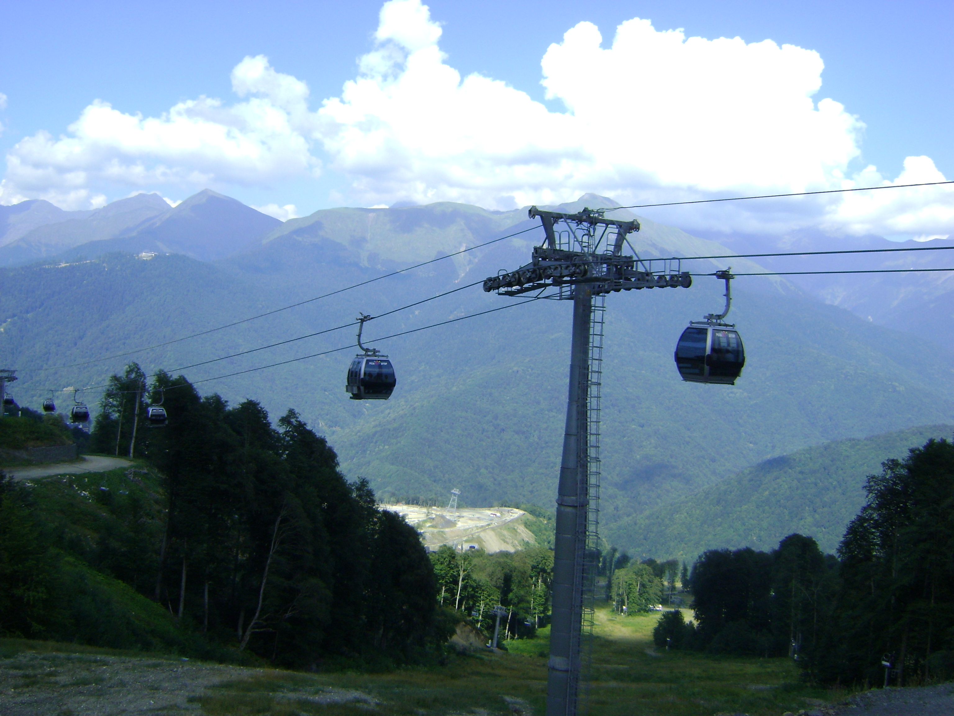 Сочі.